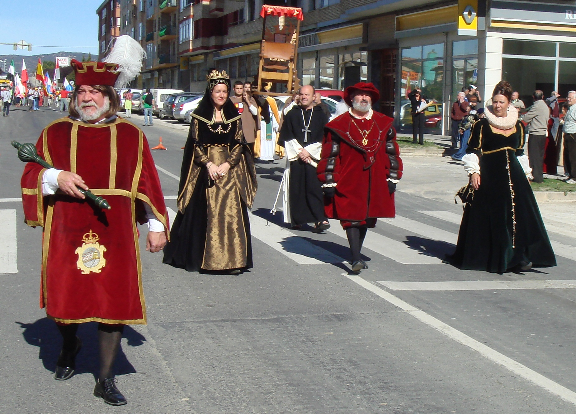 Ruta del Emperador, llegada a la ciudad de Medina de Pomar, 2007